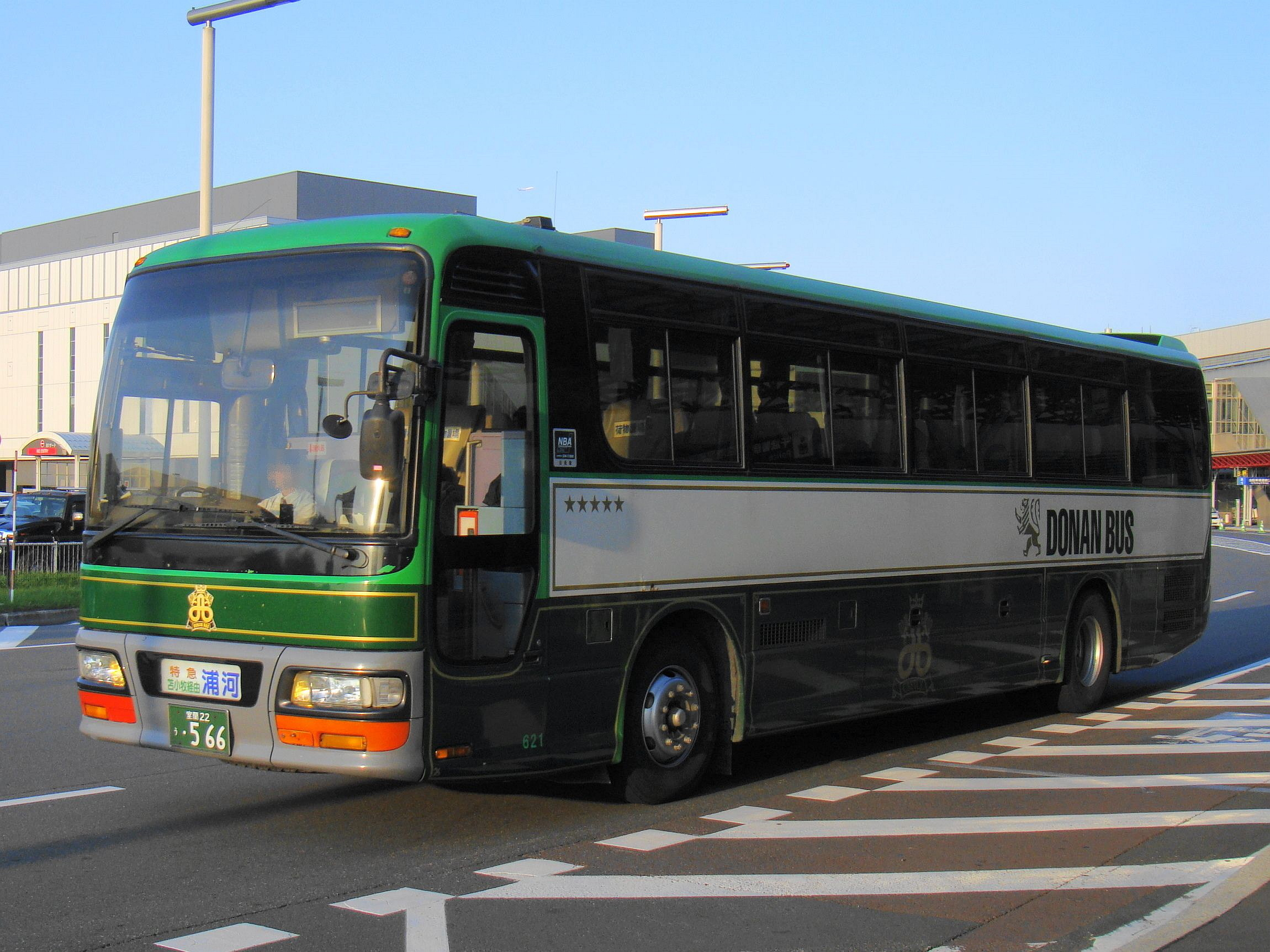 "Tokkyuū Urakawa gō" New Chitose Airport to Urakawa